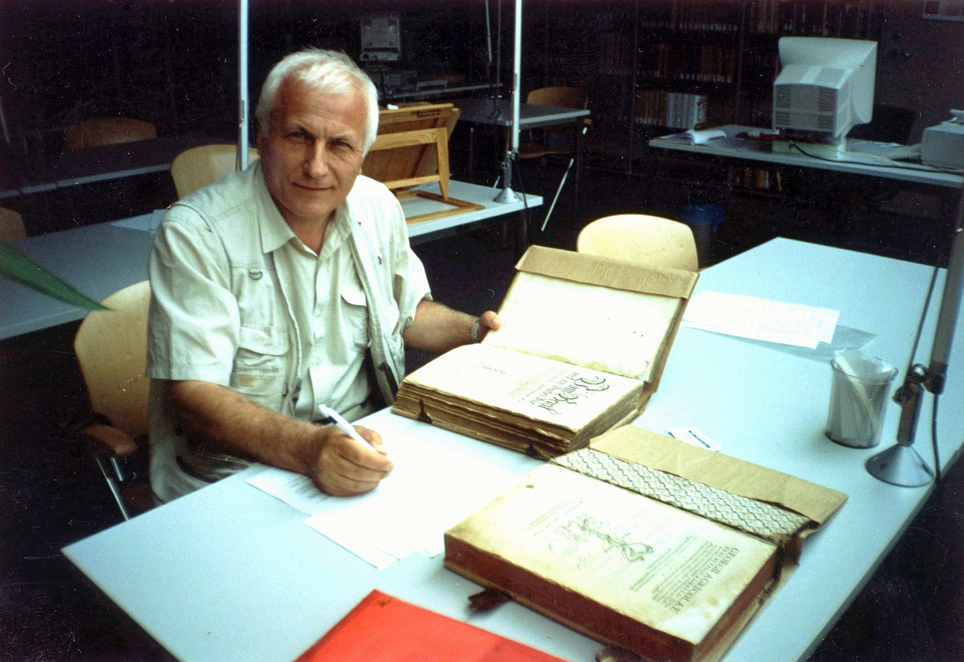 У бібліотеці Варшавского університету.Білецький Володимир Стефанович у Польщі, робота із твором Ґеорґіуса Аґріколи "De re metallica libri XII".